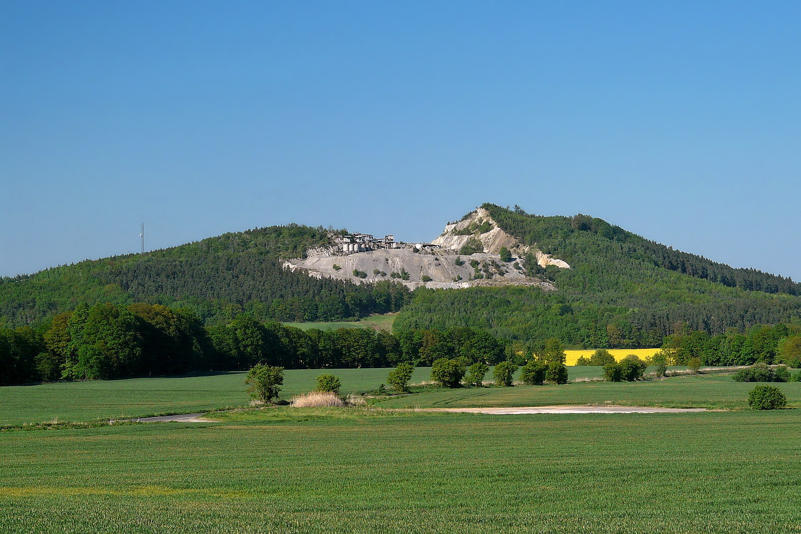 Tachovský vrch od jihozápadu